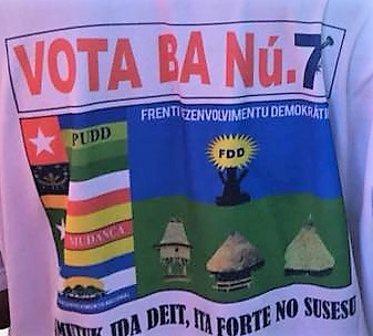 Wahlkampf-T-Shirt der FDD